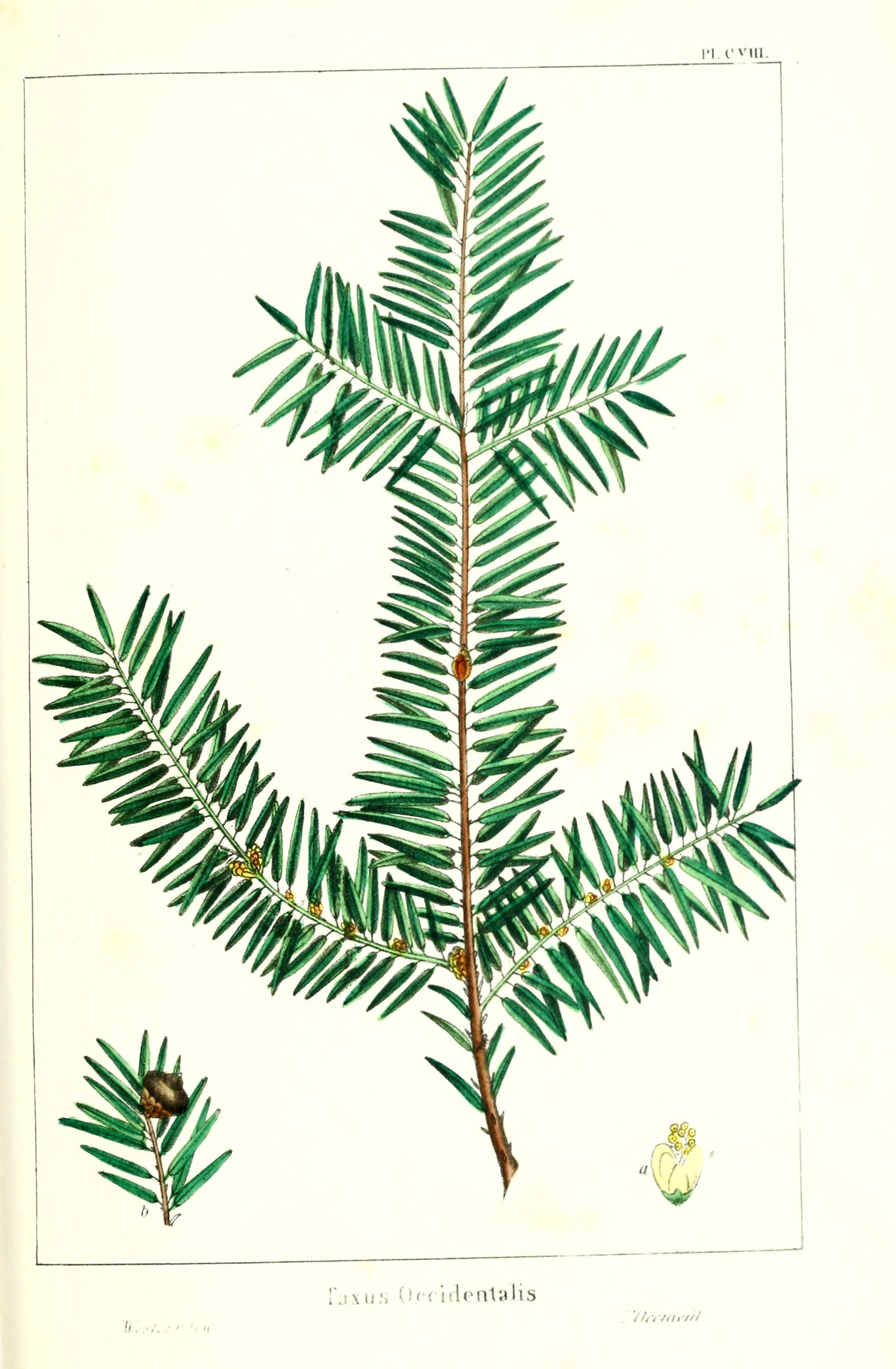 1 vy\\. jxii.'i (.'re i(l(Mit:»lis "R7..V'. / " ', .. '/In f(ii/fi